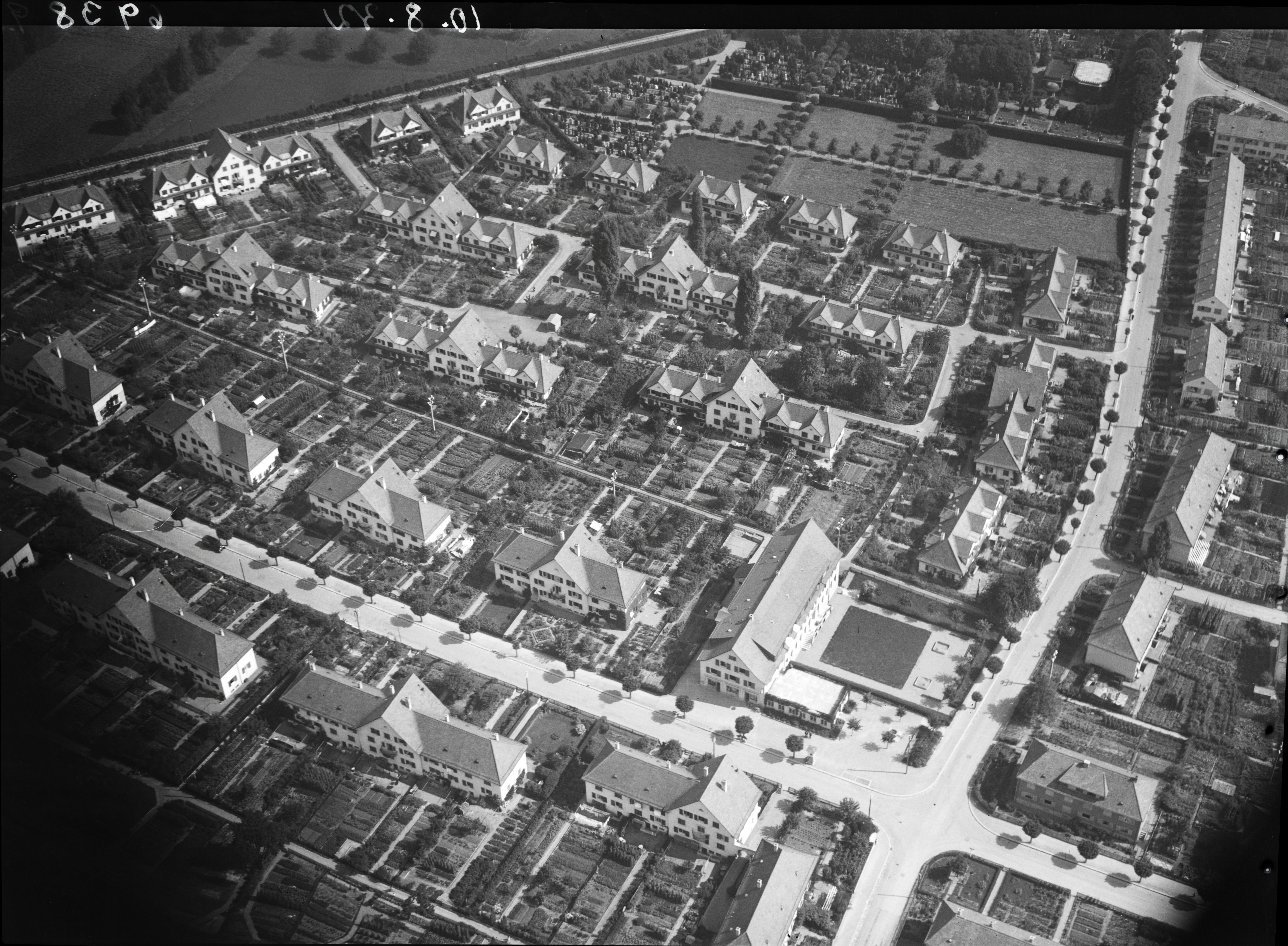 Rechts: Teile der 4. Etappe der Familienheimgenossenschaft, Staffelhof; oben rechts: Israelitische Friedhof. Blickrichtung Nordosten